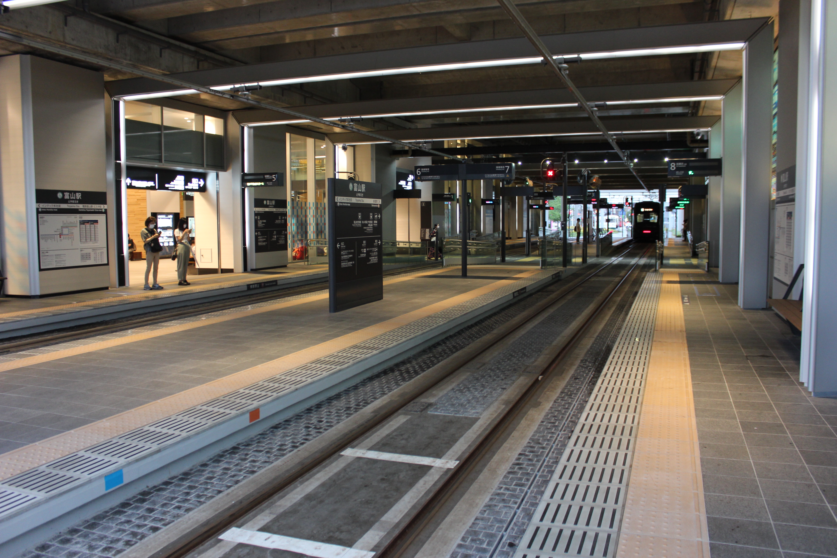 富山駅停留場（2020年撮影）